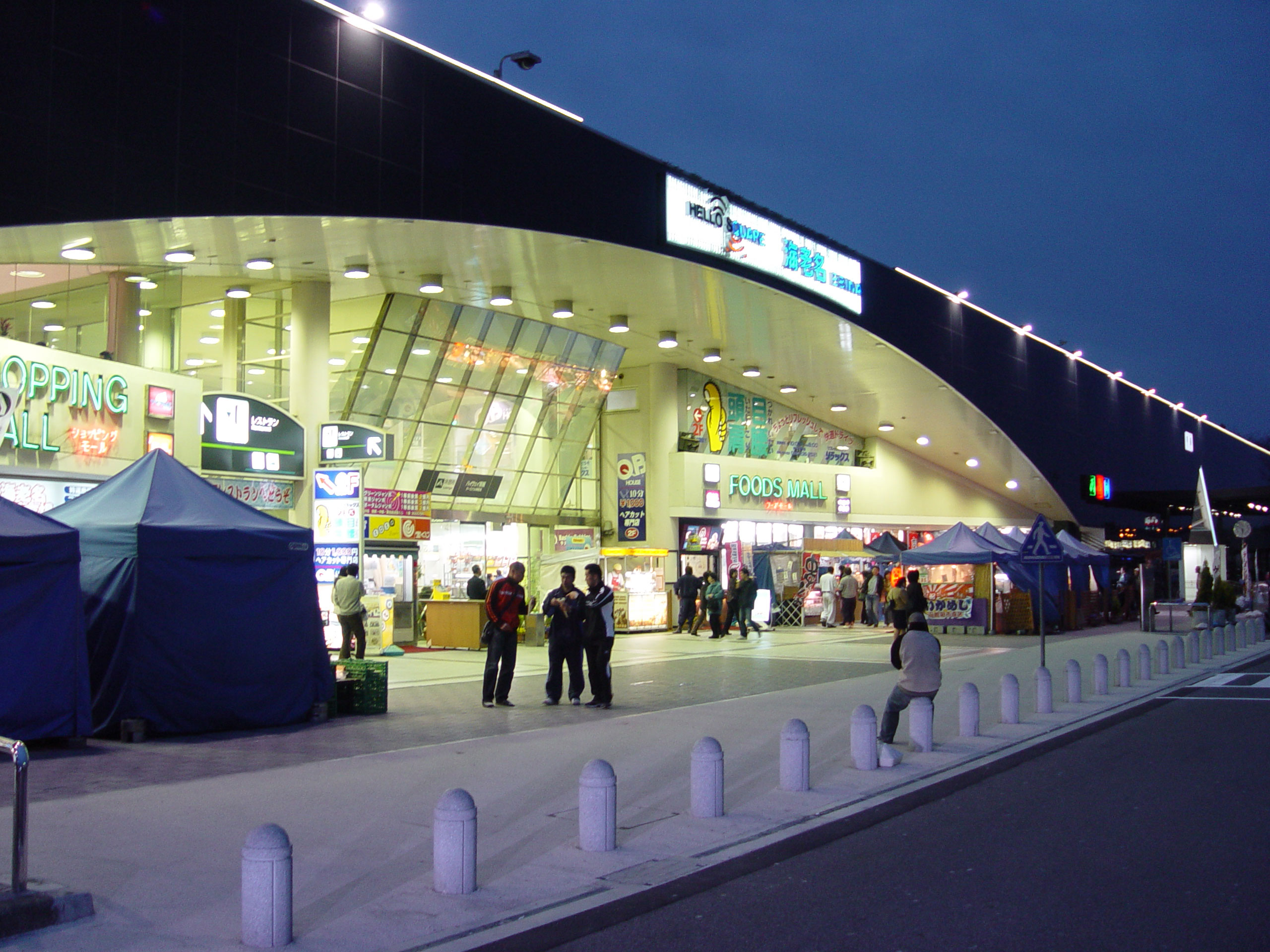 Ebina Service Area, up line 海老名サービスエリア上り線